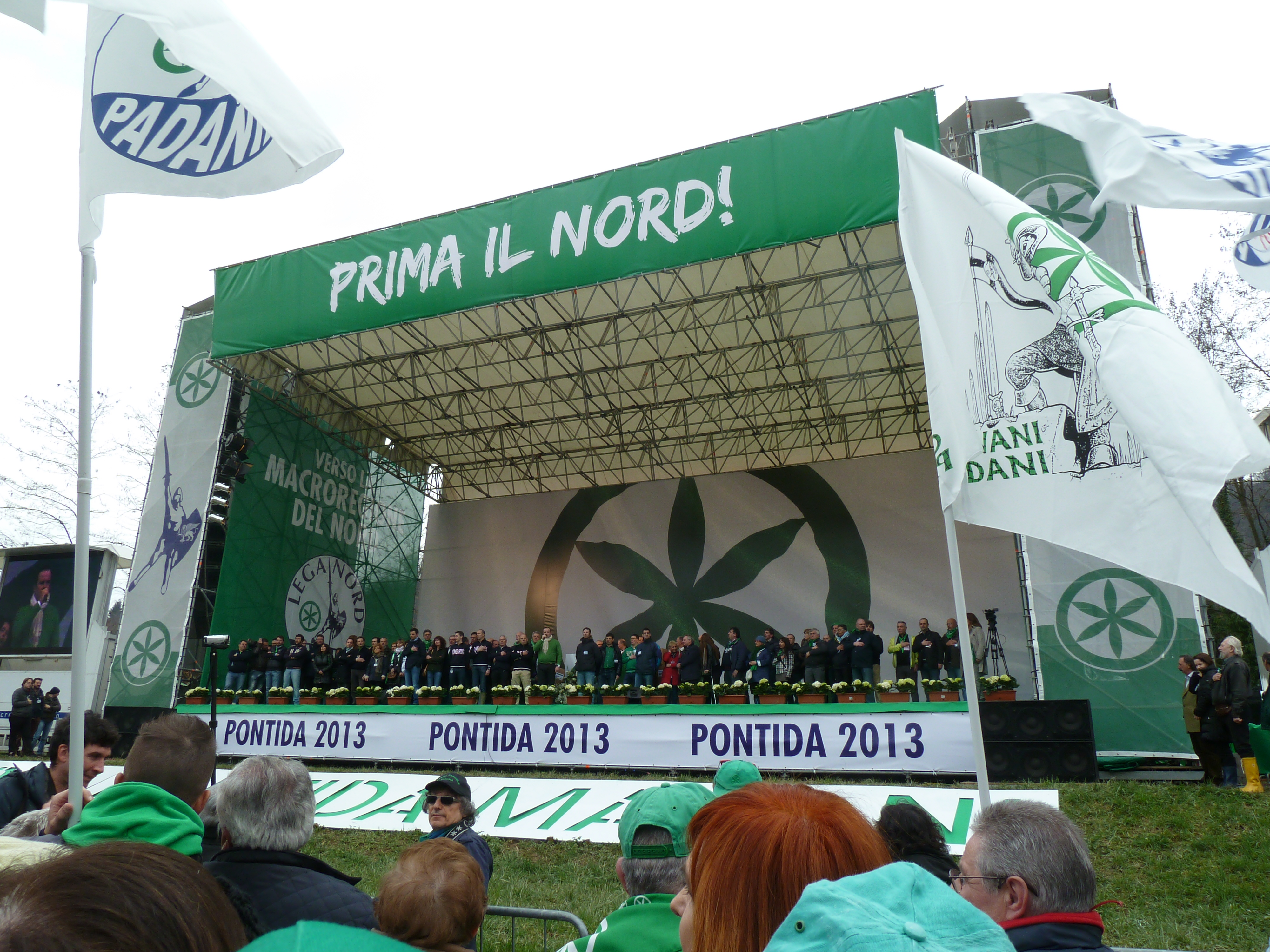 Foto dal raduno della Lega Nord a Pontida ad aprile 2013.